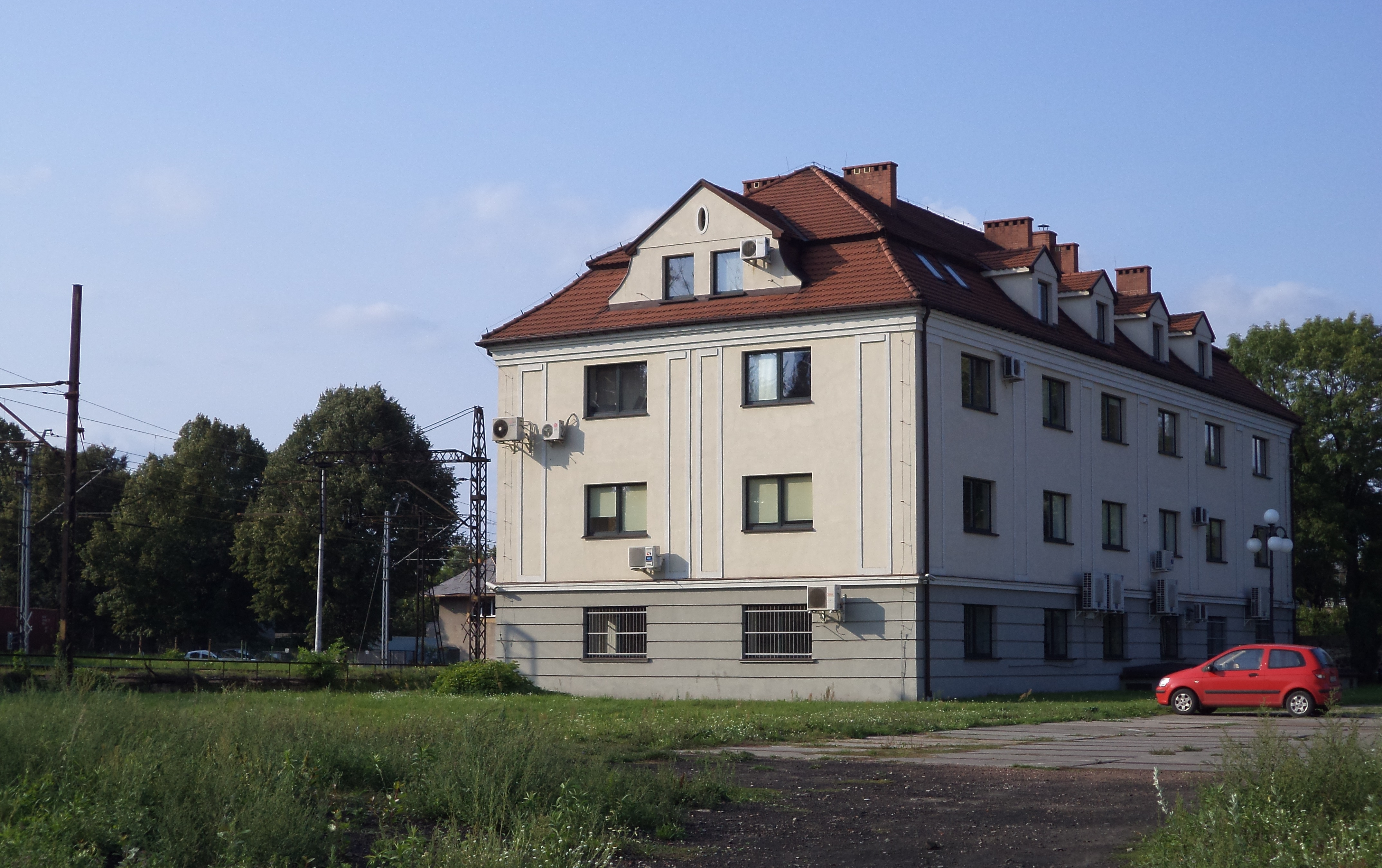 PKP PLK - Zakład Linii Kolejowych w Tarnowskich Górach